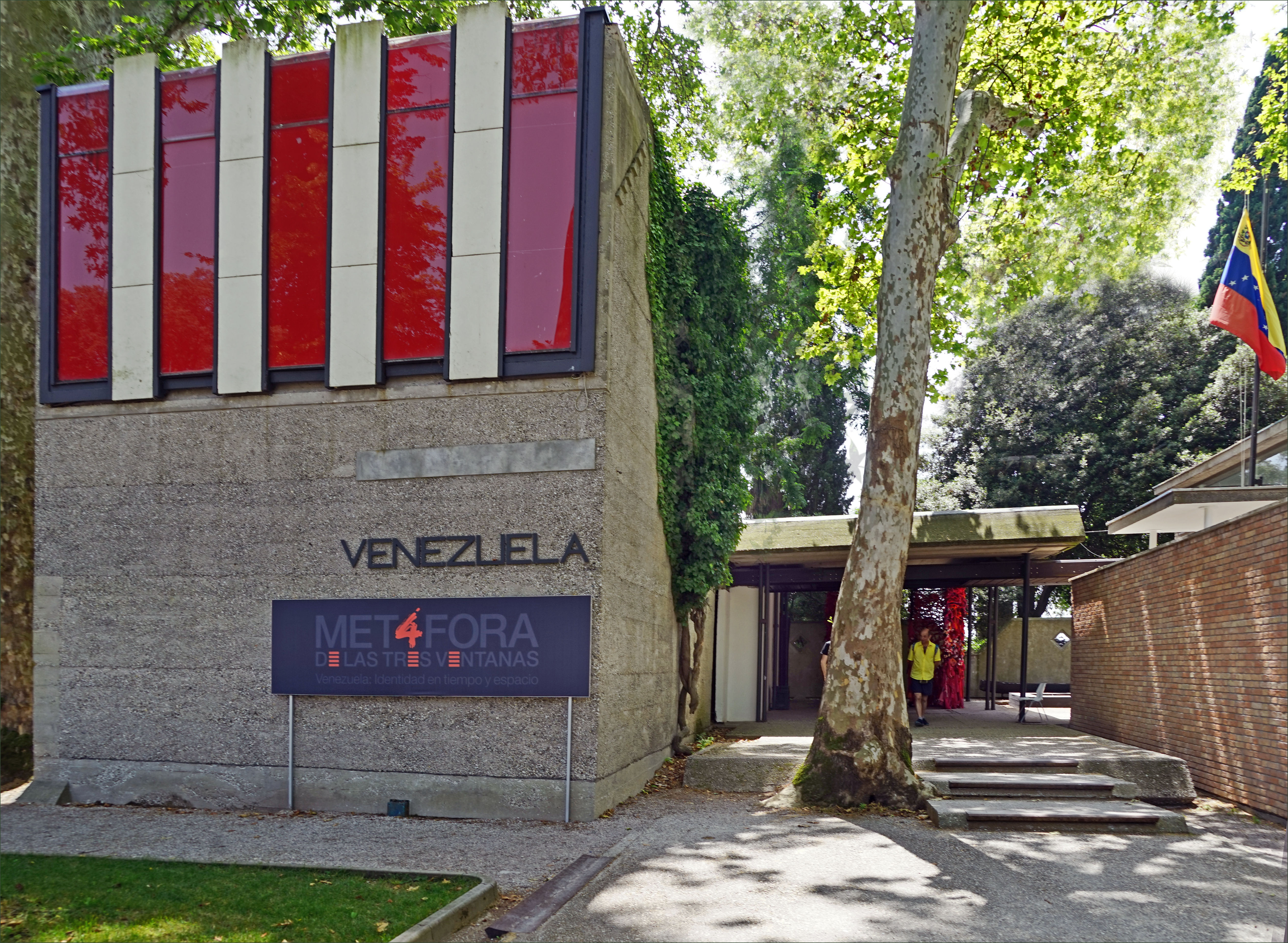 Le pavillon du Vénézuela a été conçu par l'architecte Carlo Scarpa en 1954-1956 Pavillon national du Vénézuela Giardini Biennale d'art de Venise 2019